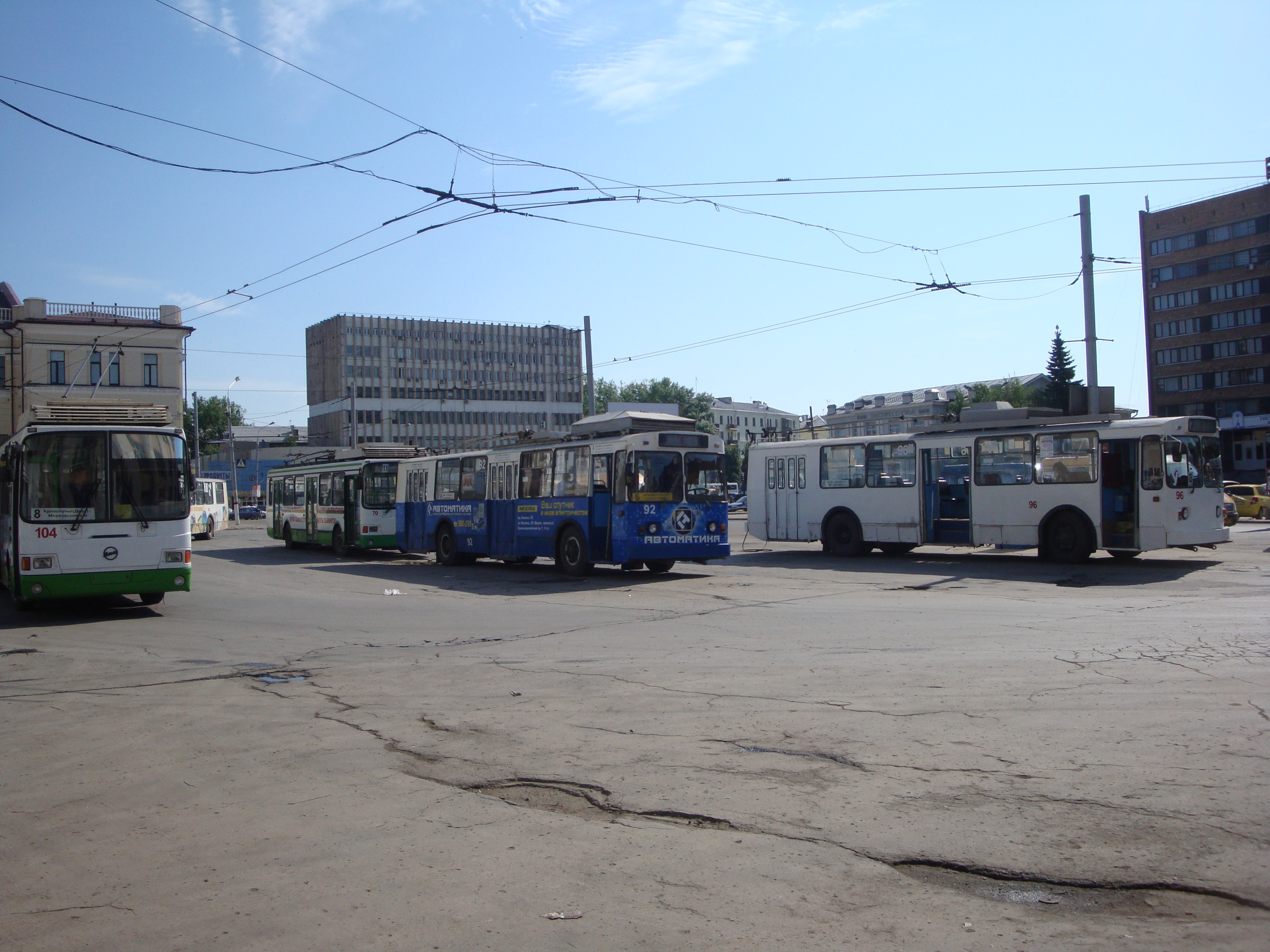 Линейная станция троллейбуса "Московский вокзал"